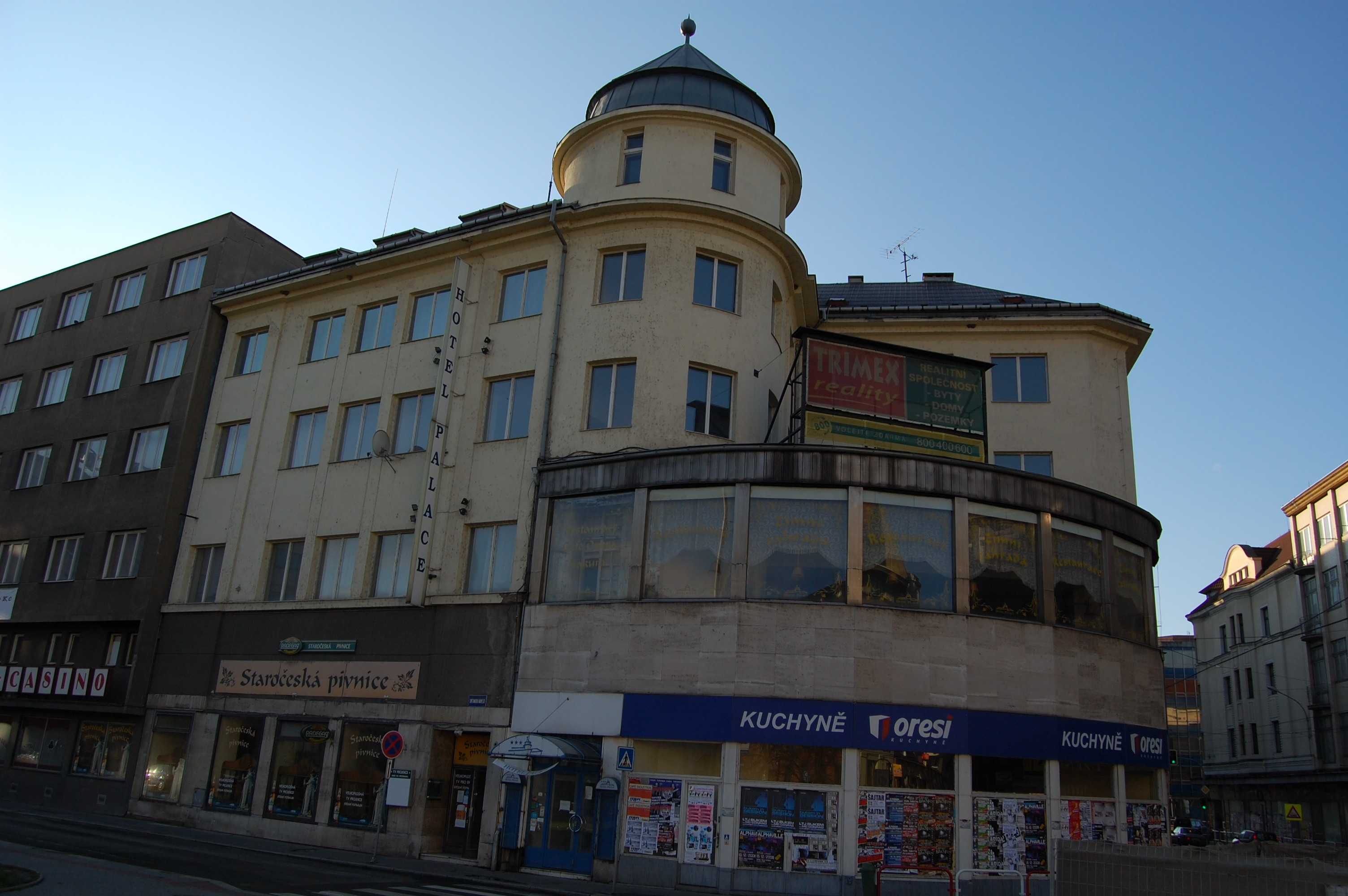 Hotel Palace in Ostrava, Czech republic.